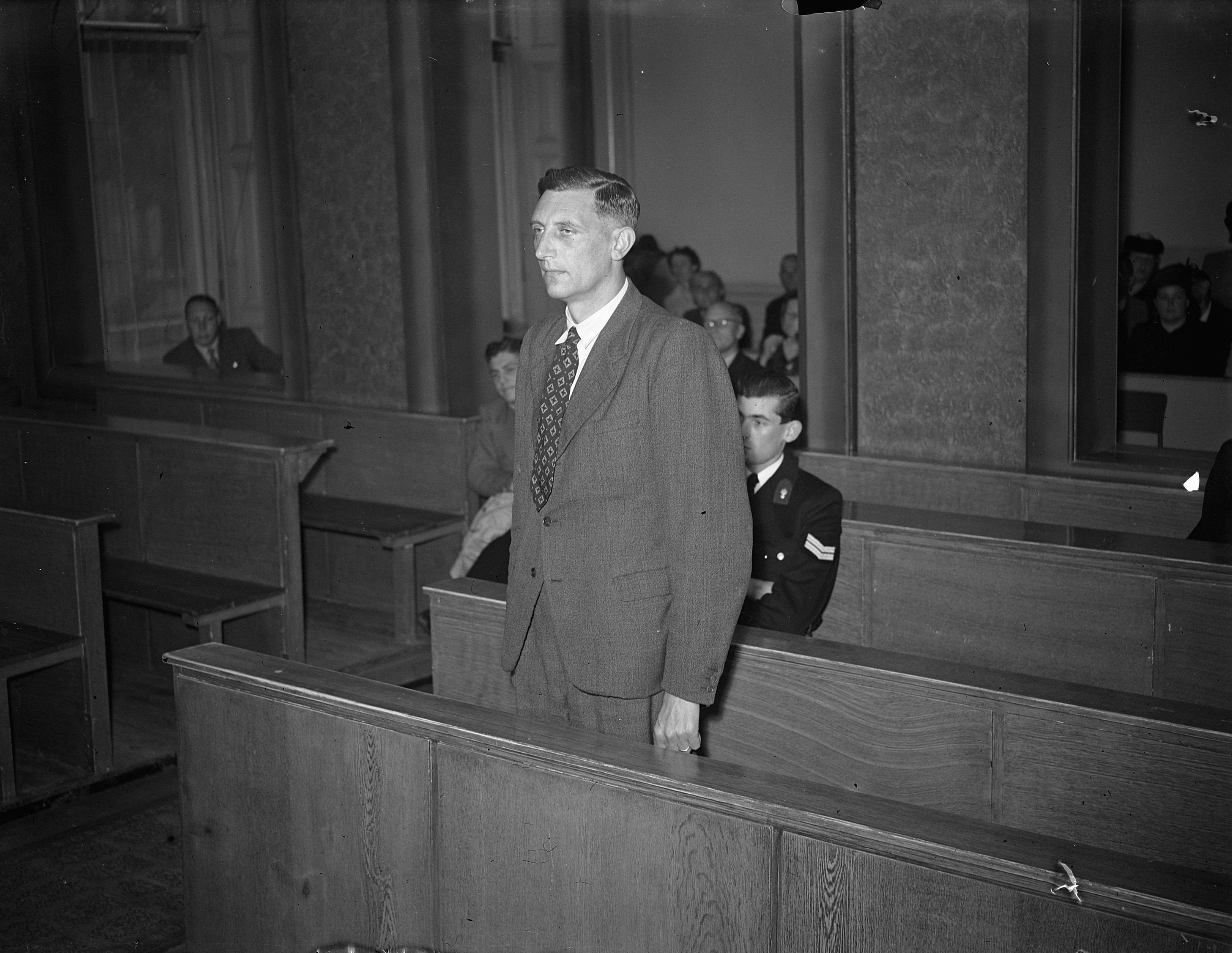 Collectie / Archief : Fotocollectie Anefo Reportage / Serie : [ onbekend ] Beschrijving : Gejus van der Meulen voor het Bijzonder Gerechtshof te Amsterdam Annotatie : Voormalig doelverdediger van HF en het Nederlands Elftal. Collaboreerde met de bezetter Datum : 20 juni 1947 Locatie : Amsterdam Trefwoorden : rechtbanken, rechtszittingen Persoonsnaam : Meulen, Gejus van der Fotograaf : Noske, J.D. / Anefo Auteursrechthebbende : Nationaal Archief Materiaalsoort : Glasnegatief Nummer archiefinventaris : bekijk toegang 2.24.01.09 Bestanddeelnummer : 902-2312